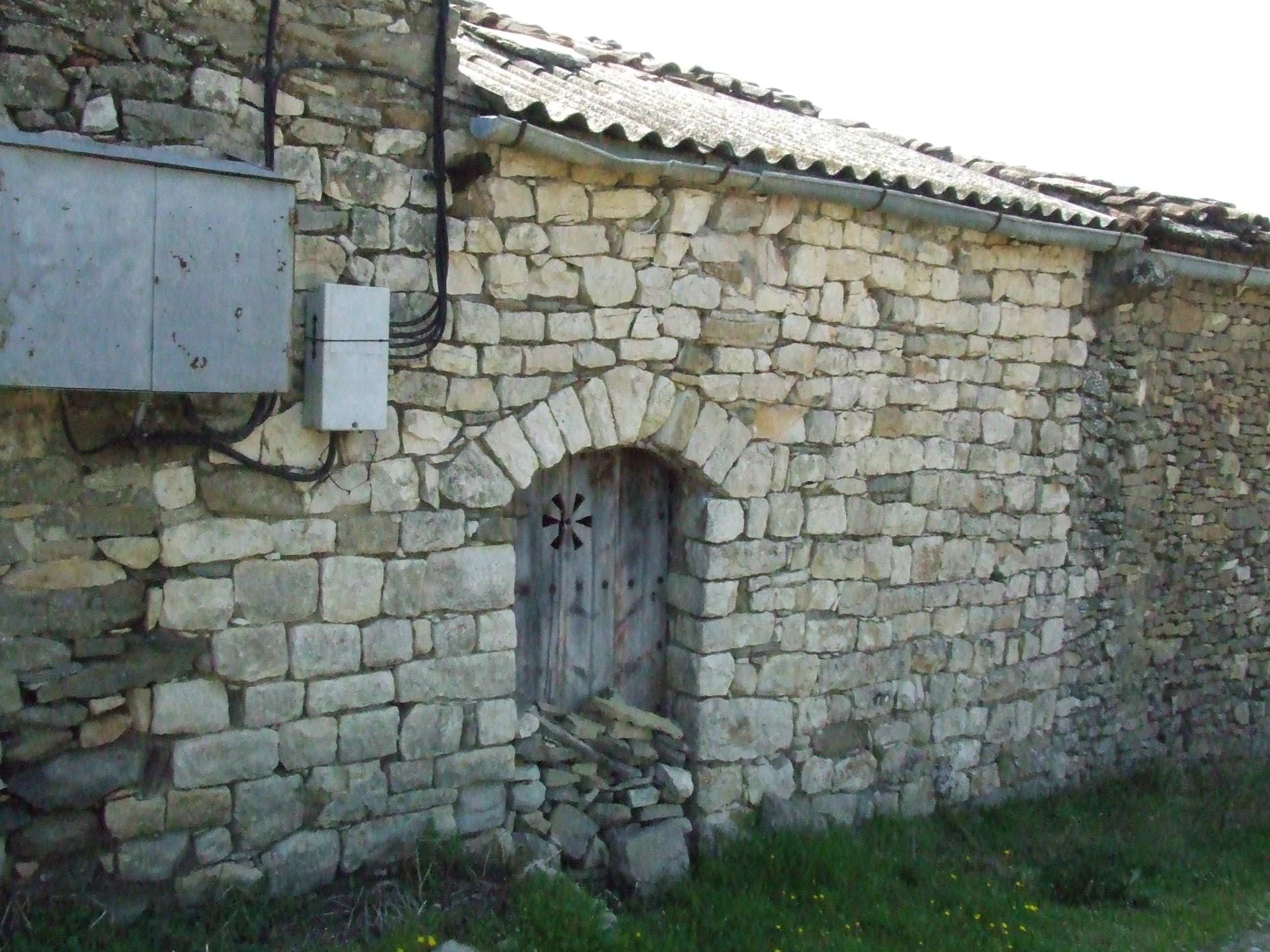 Capella de Sant Miquel de Collmorter (Mur, Castell de Mur, Pallars Jussà)